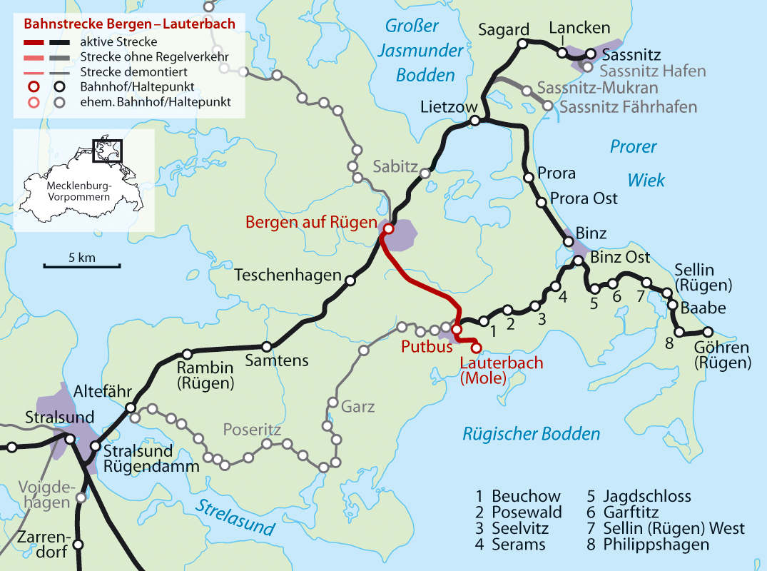 Karte der Bahnstrecke Bergen–Lauterbach Mole